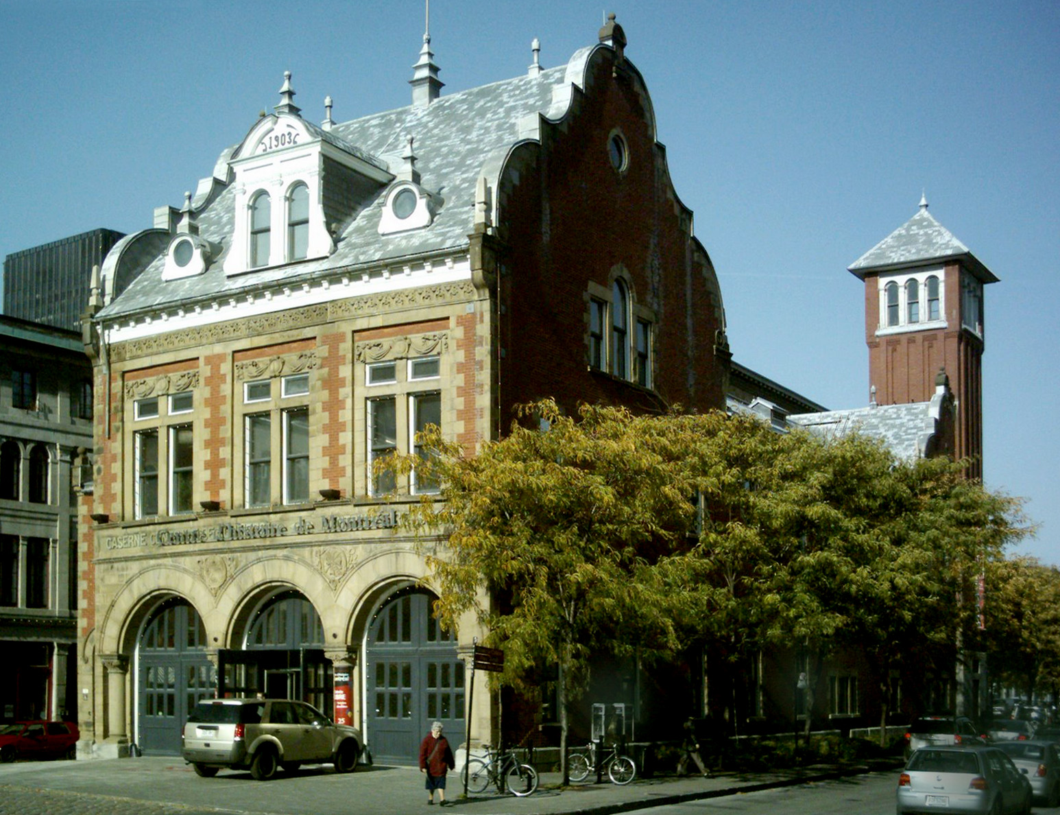 Le Centre d'histoire de Montréal est situé dans une ancienne caserne de pompier à la place d'Youville dans le Vieux-Montréal.